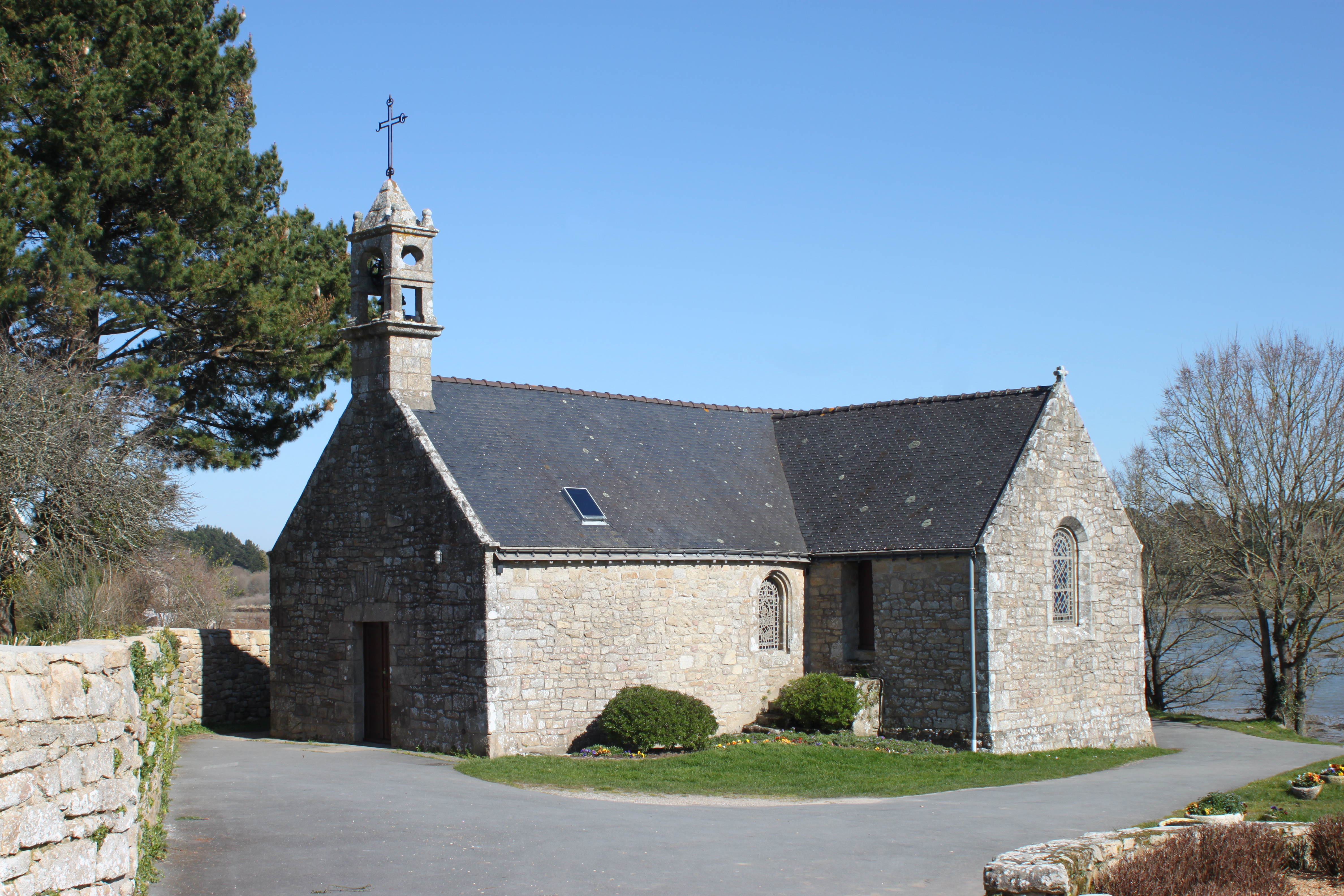 Chapelle Saint-Philibert, dite Notre-Dame des Flux et Reflux ou Notre-Dame du Ster, Fr-56-Saint-Philibert.